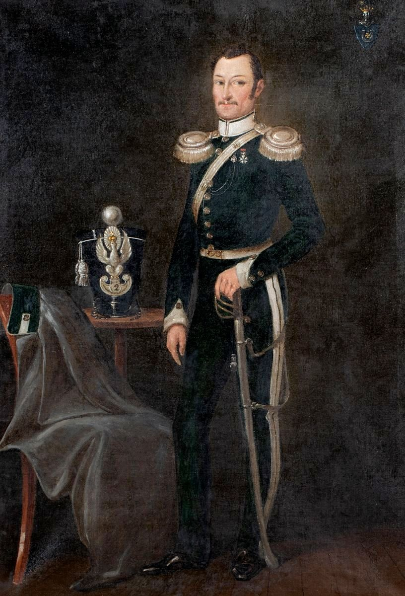 Portret generała Franciszka Czarnomskiego herbu Jastrzębiec (1783-1855)